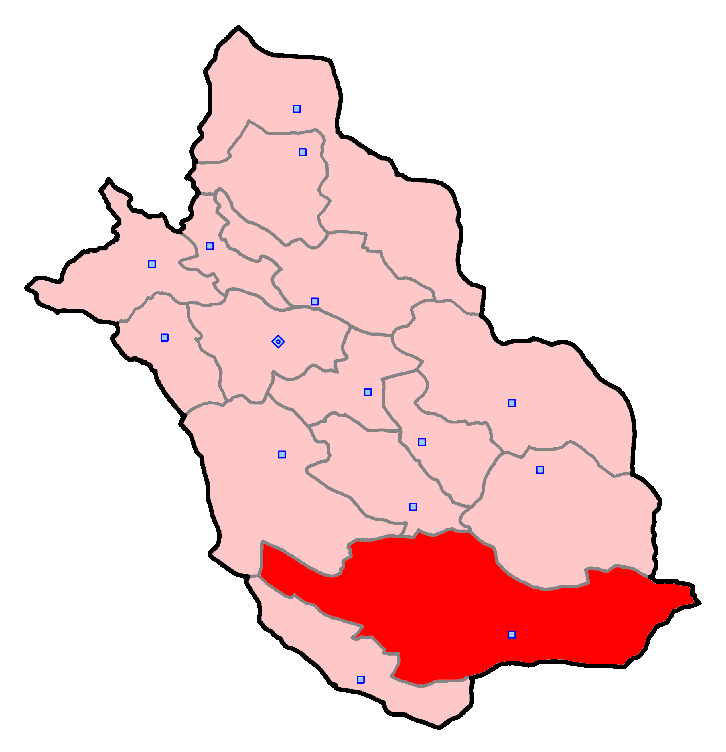 حوزهٔ انتخاباتی لارستان و خنج برای انتخابات مجلس شورای اسلامی